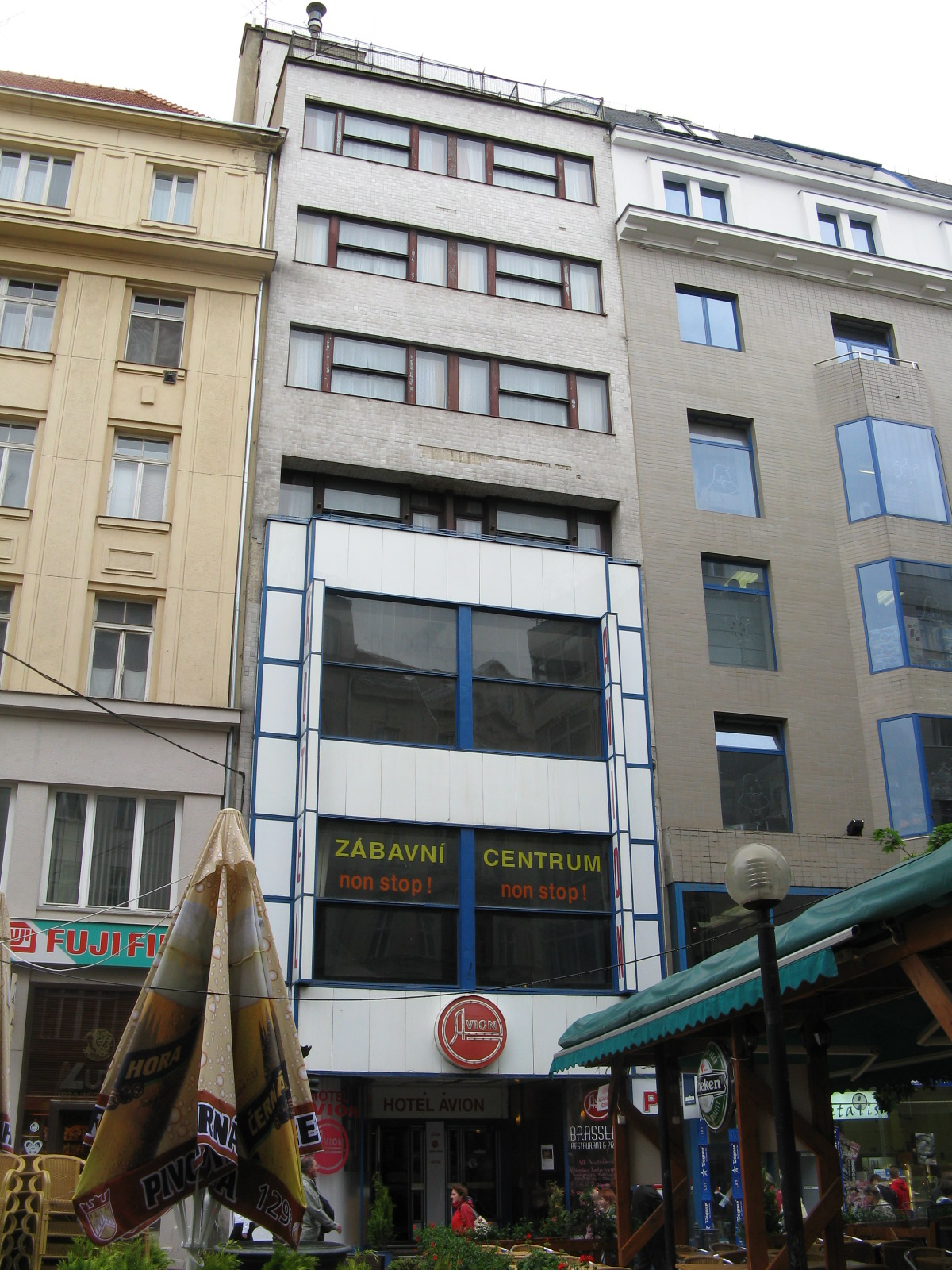 Hotel Avion, Brno, Česká Street